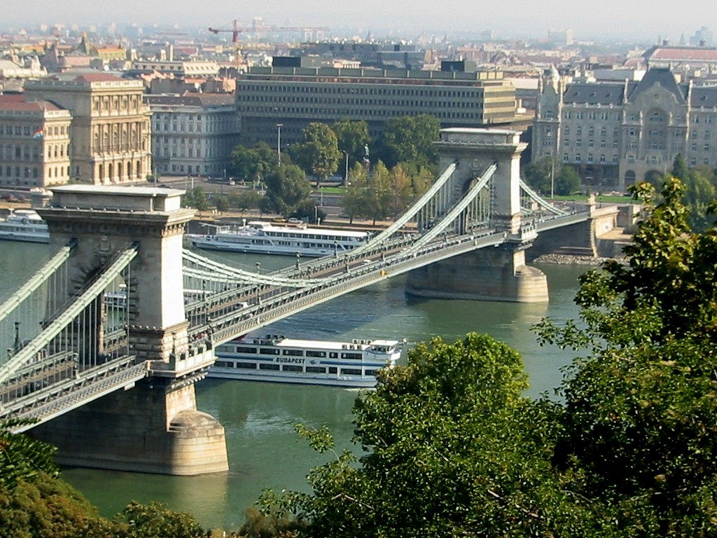 Spenótház